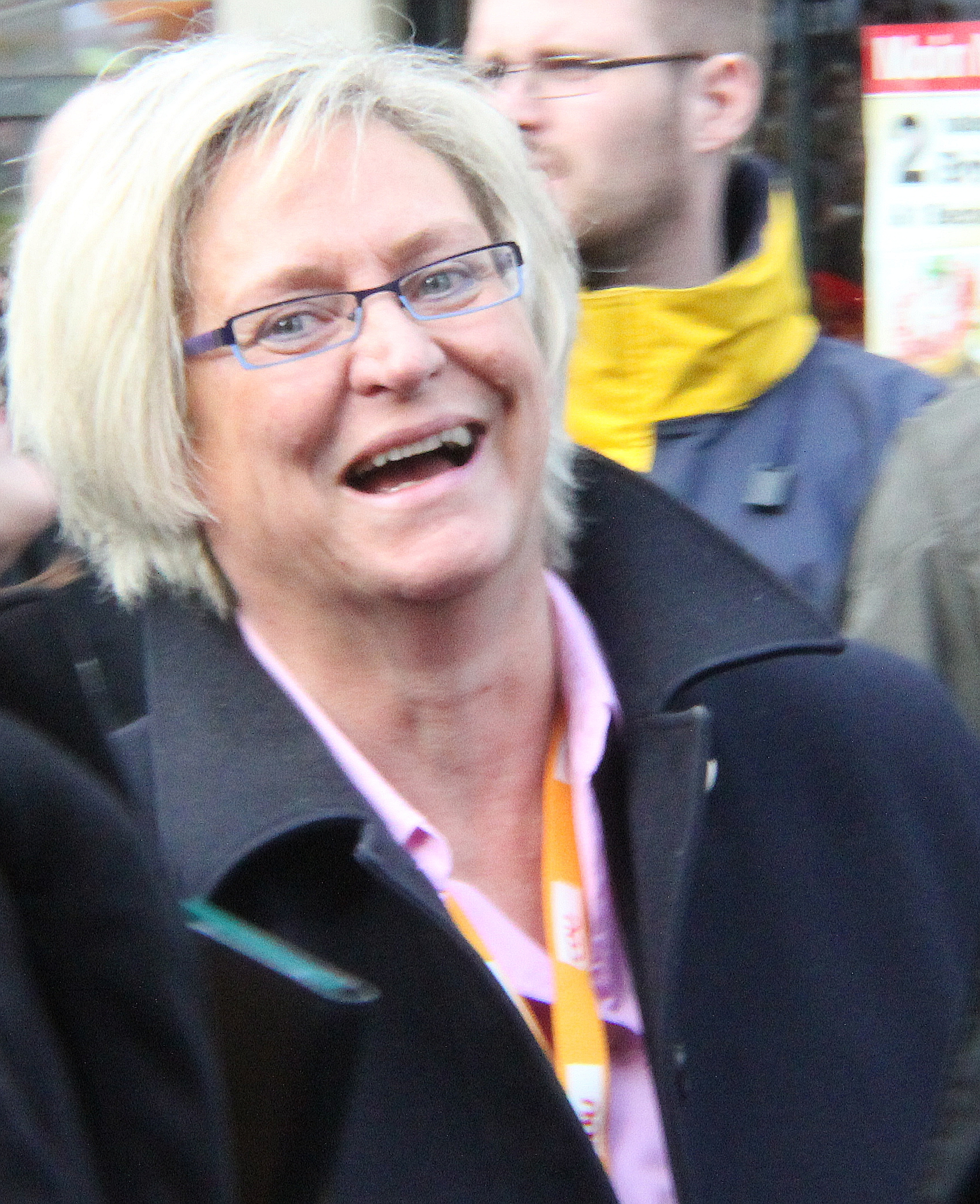 Susanne Herold - Christlich Demokratische Union Deutschlands (CDU) - Flensburg